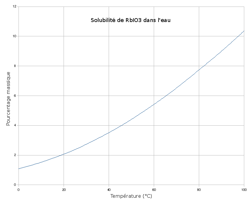 Solubilité de RbIO3 dans l'eau en fonction de la température.